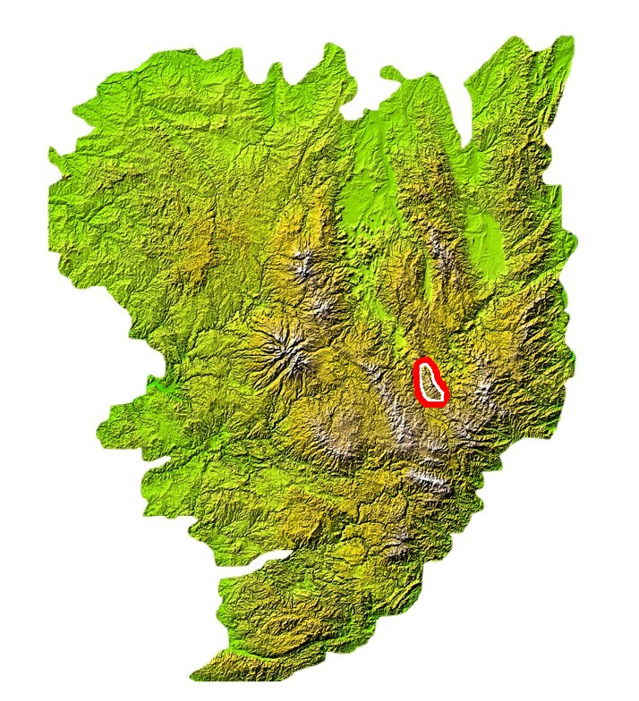 Situation des Monts du Devès sur la carte du Massif Central